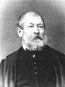 Szentiványi Károly (1802–1877) politikus, országgyűlési képviselő, kormánybiztos.